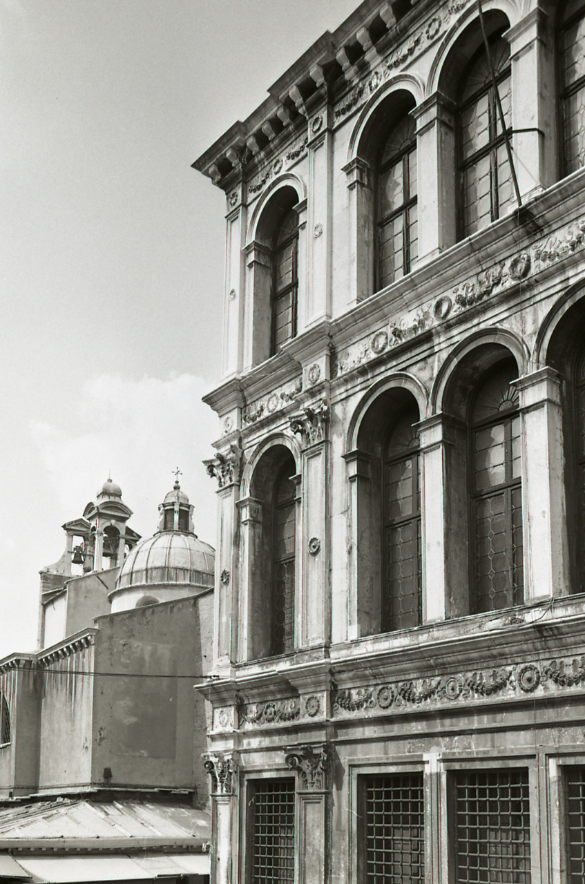 Servizio fotografico : Venezia, 1977 / Paolo Monti. - Strisce: 4, Fotogrammi complessivi: 22 : Negativo b/n, gelatina bromuro d'argento/ pellicola ; 35 mm. - ((Sul portanegativi: N[I]K[MA]T FP4. . - (3):. - 2A-12A = Scuola Grande di San Giovanni Evangelista, interno; . - 13A-17A = Chiesa di San Giovanni Crisostomo, esterno, particolari;. - 18A-23A = Palazzo Contarini dalle Figure, esterno con particolari. - Occasione: Pubblicazione (Electa, 1977). - Fonte: Agenda di Paolo Monti: Leica 1501-3000 Controllo numerazione (1950-1978), presso Archivio Paolo Monti. - Fonte: Fattura di Paolo Monti: IV. Commesse/ Fattura n. 05/ Fotografie per volume architetto veneziano Codussi - Prof. Puppi (1977/03/31), presso Archivio Paolo Monti. - Fonte: Monografia di Olivato Loredana, Puppi Lionello: Mauro Codussi, Milano, Electa (1977)